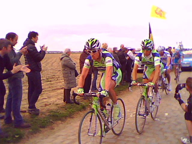 2 coureurs de l'écuipe cycliste Liquigas lors de l'édition 2008 de Paris-Roubaix sur le secteur du Carrefour de l'Arbre.